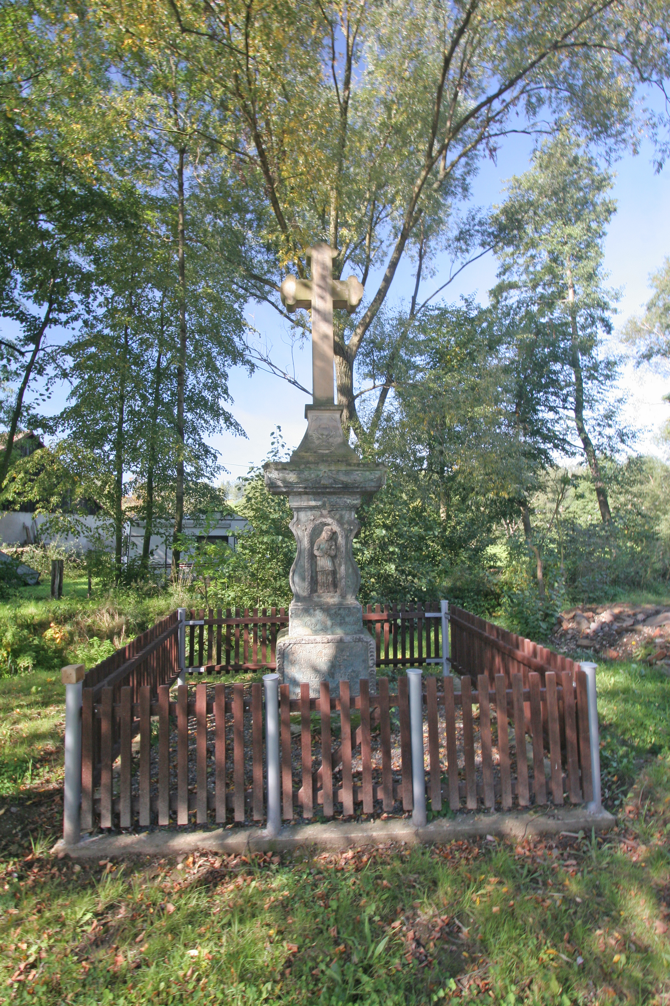 Načešice křížek u zbrojnice